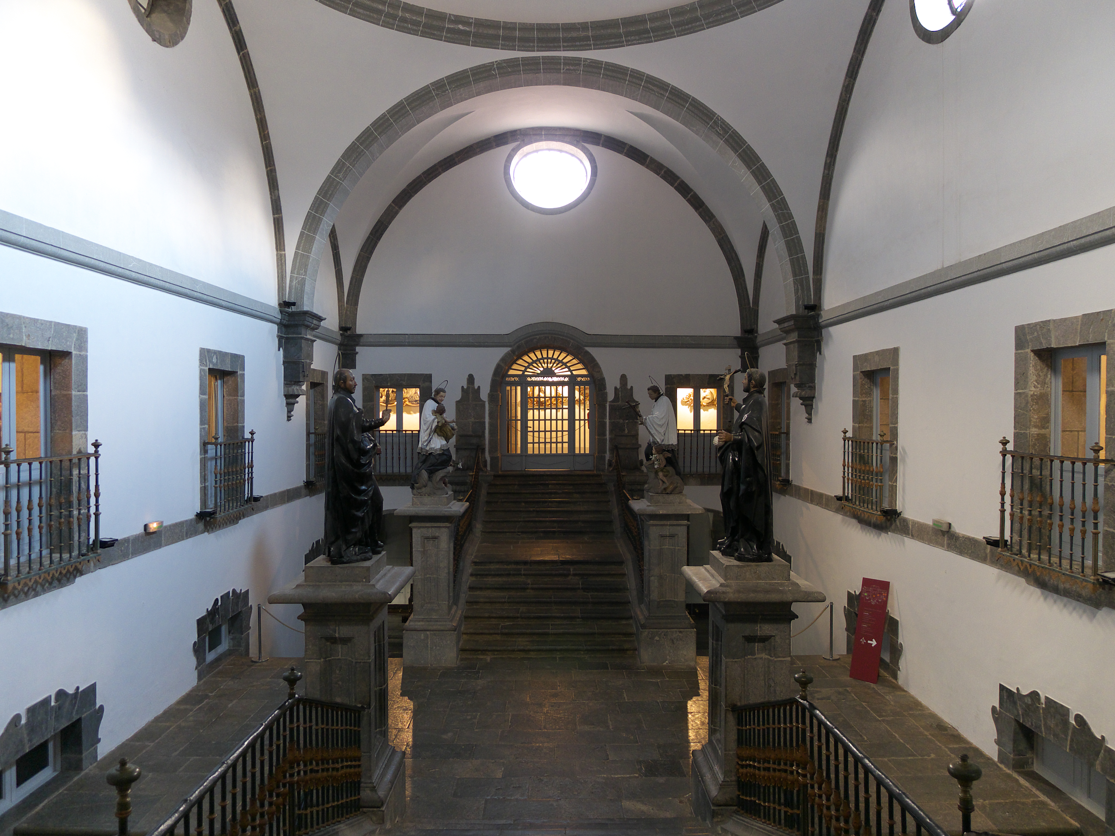 Una de las "Escaleras Imperiales". Situada en el ala sur, es obra de Martín de Zaldúa (1704).